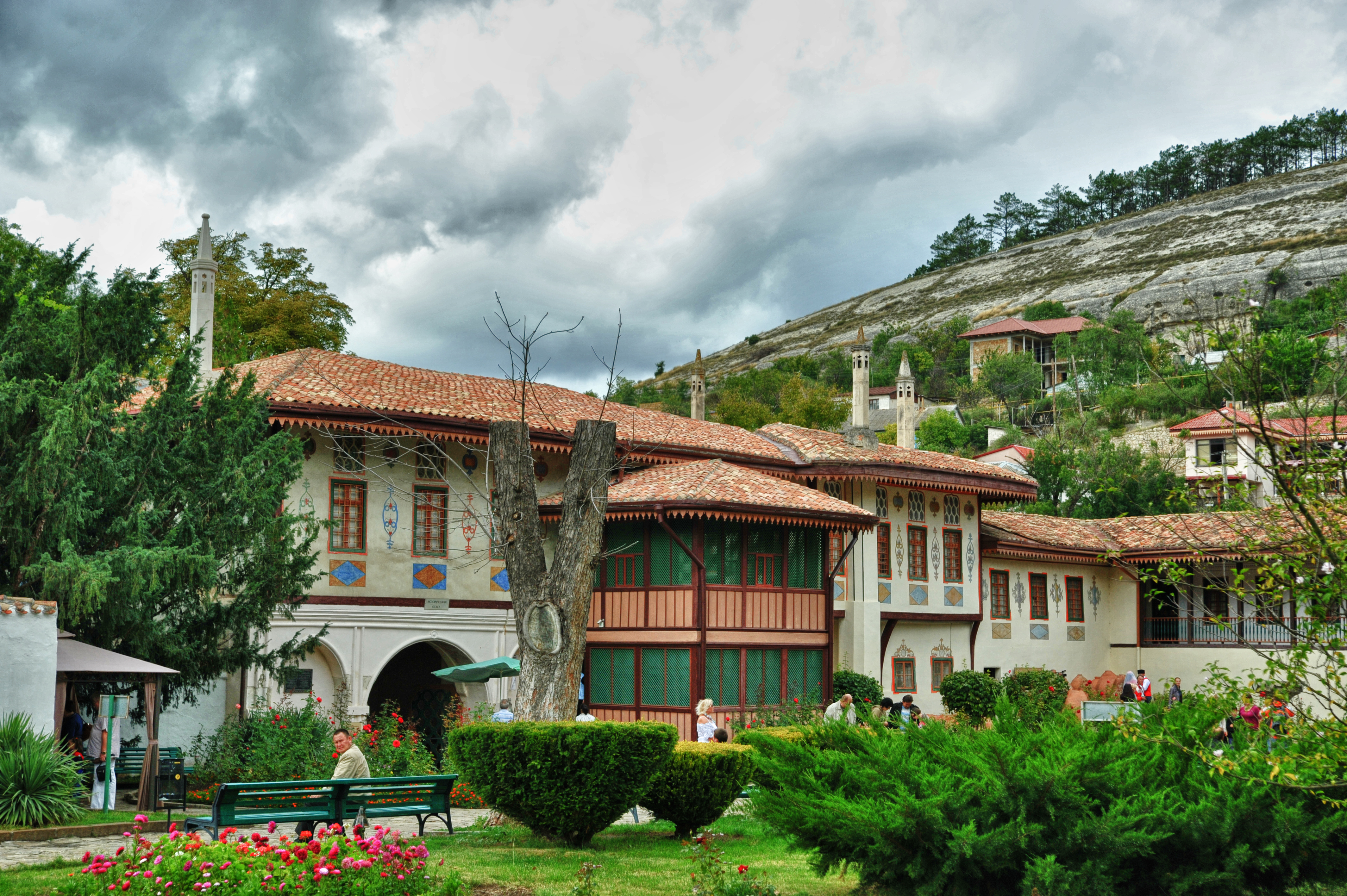 Бахчисарайський палацово-парковий комплекс (Ханський палац), Бахчисарай, вул. Річкова, 133